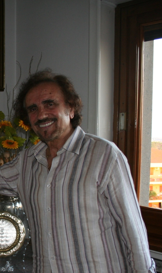 Toni Santagata